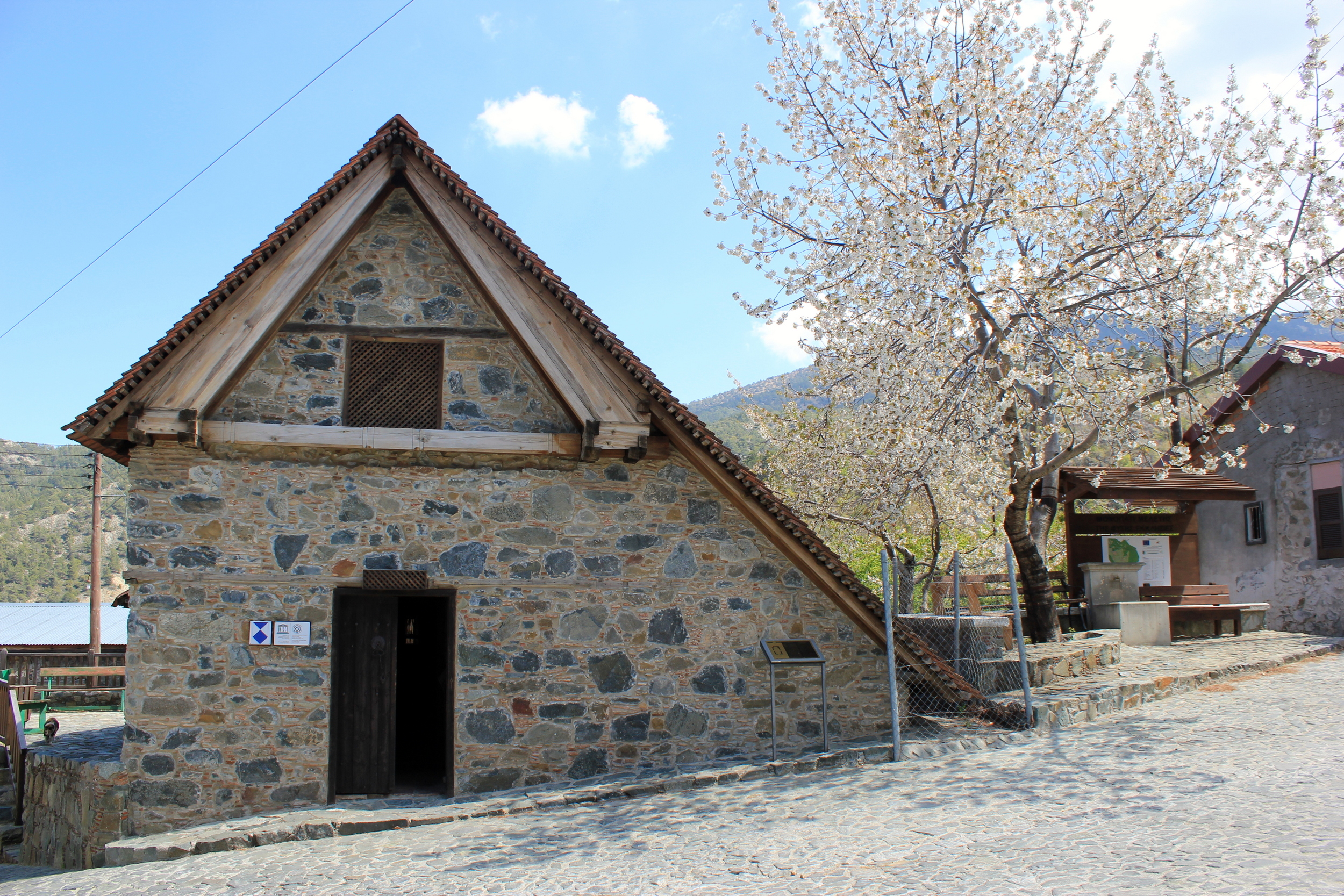 Die Scheunendachkirche des Erzengels Michael in Pedoulas, Zypern.